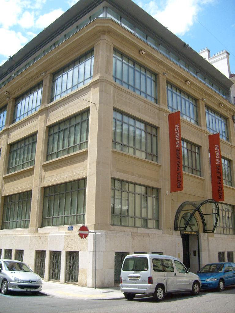 Musée Patek Philippe de Genève (Suisse)